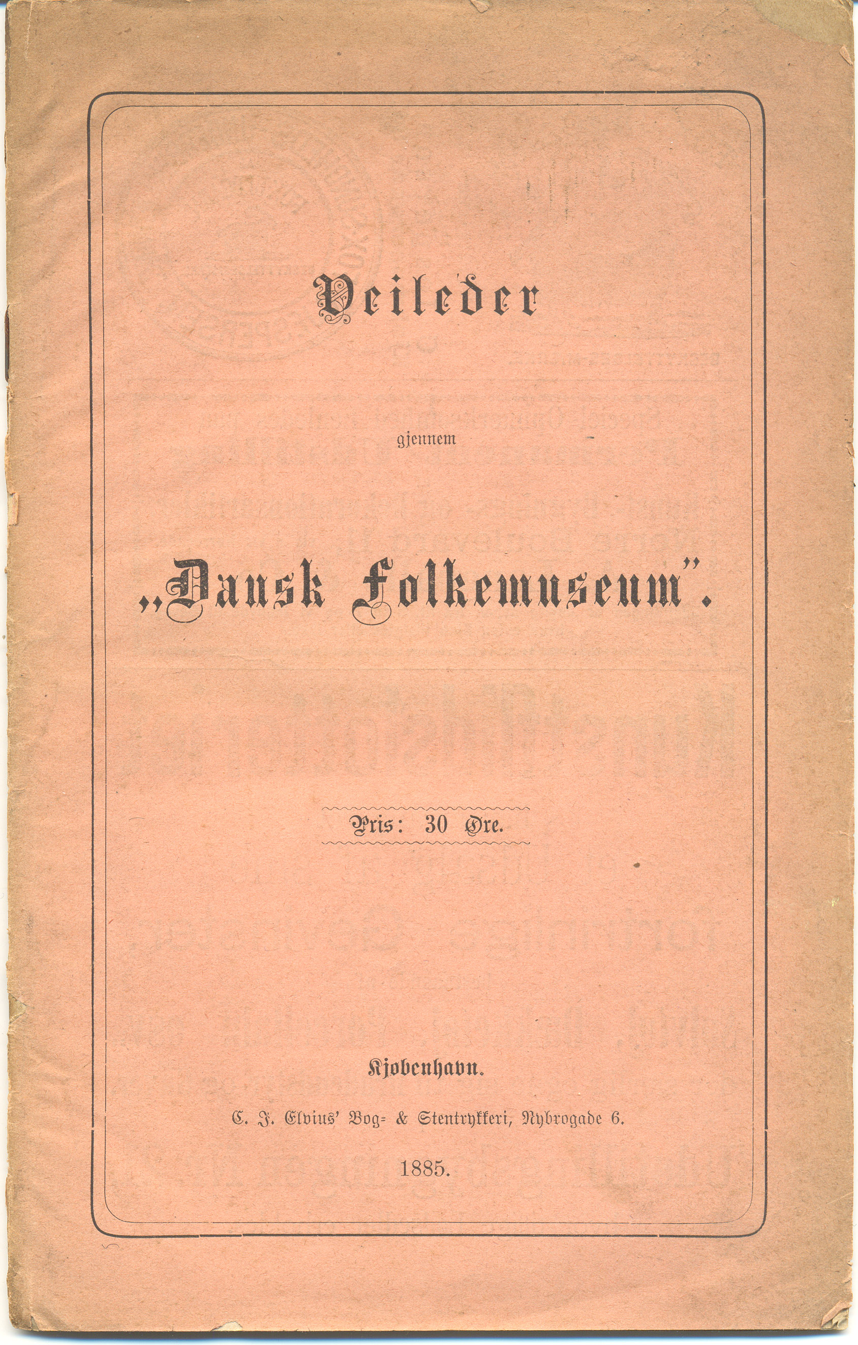 Omslaget på "Veileder gjennem Dansk Folkemuseum" fra 1885 af Bernhard Olsen. Vejledningen er på 46 s.